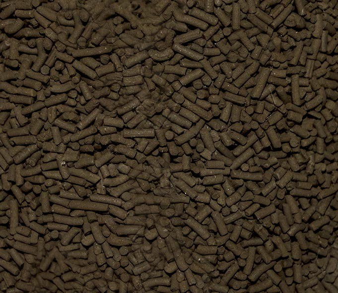 Гопкалит